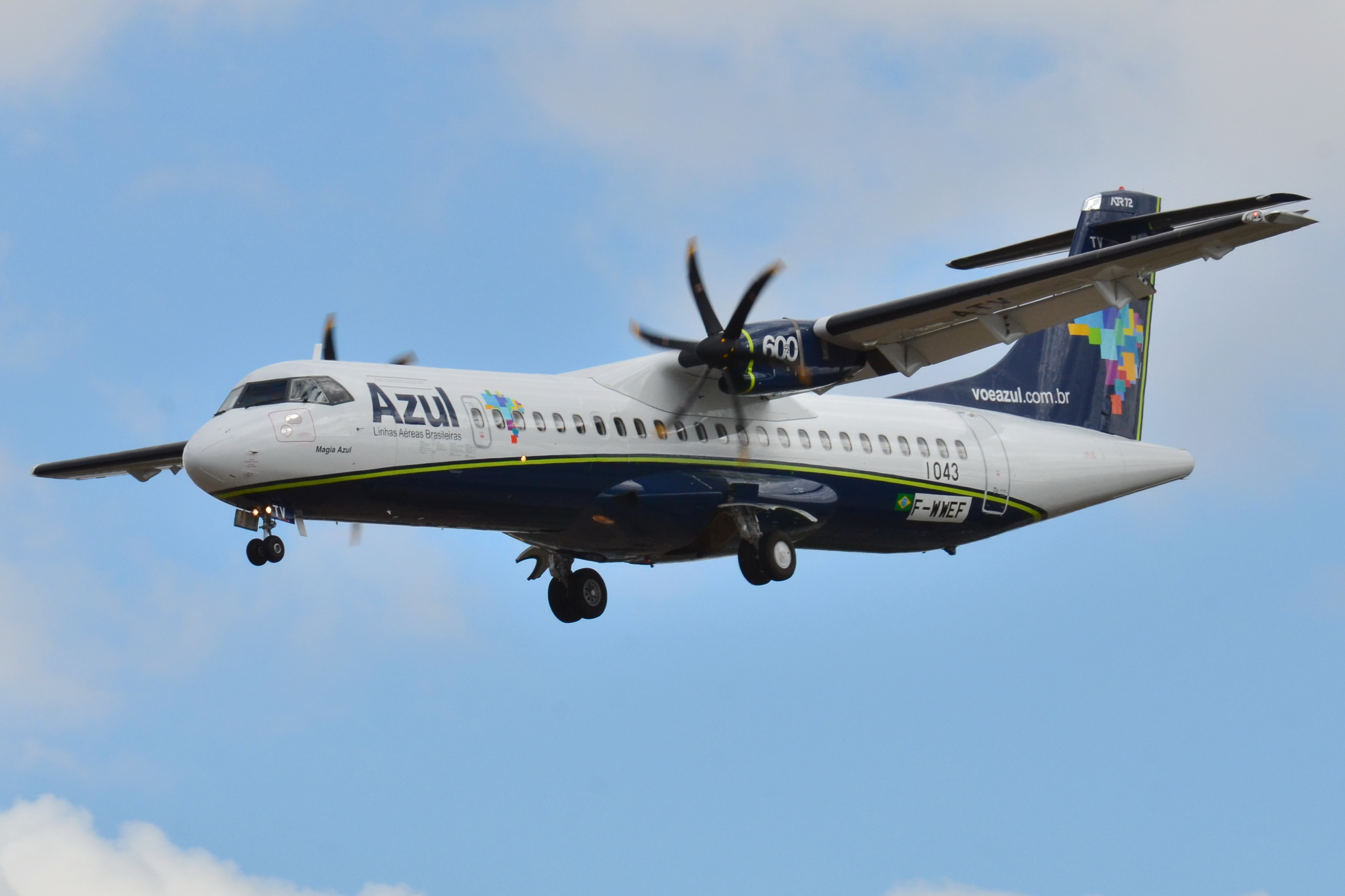 Photo prise à l'aéroport de Toulouse-Blagnac (LFBO) en France. Picture take at Toulouse-Blagnac Airport (LFBO) in France.